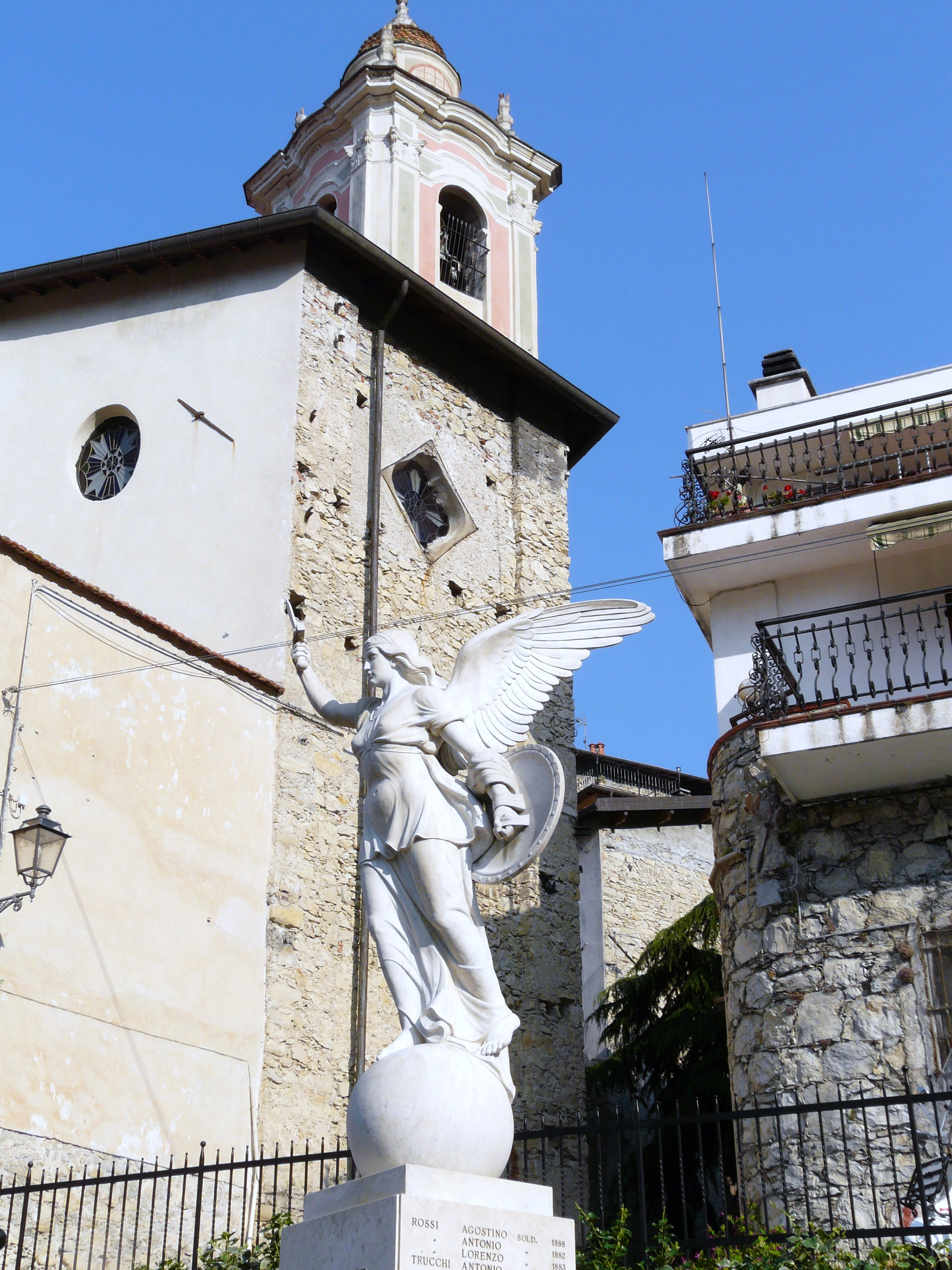 Monumenti ai caduti, Airole, Liguria, Italia